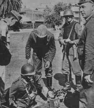 Fotografía de un operativo por parte de la policia uruguaya en Montevide, de búsqueda de integrantes del MLN - Tupamaros en la red cloacal de esa ciudad.